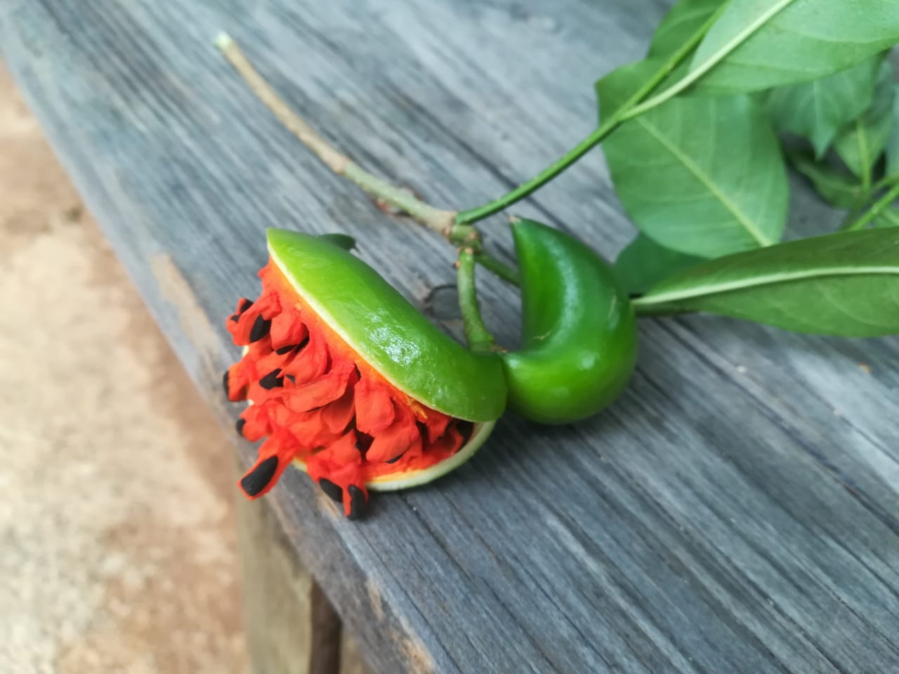 Fruto de la Roqueta